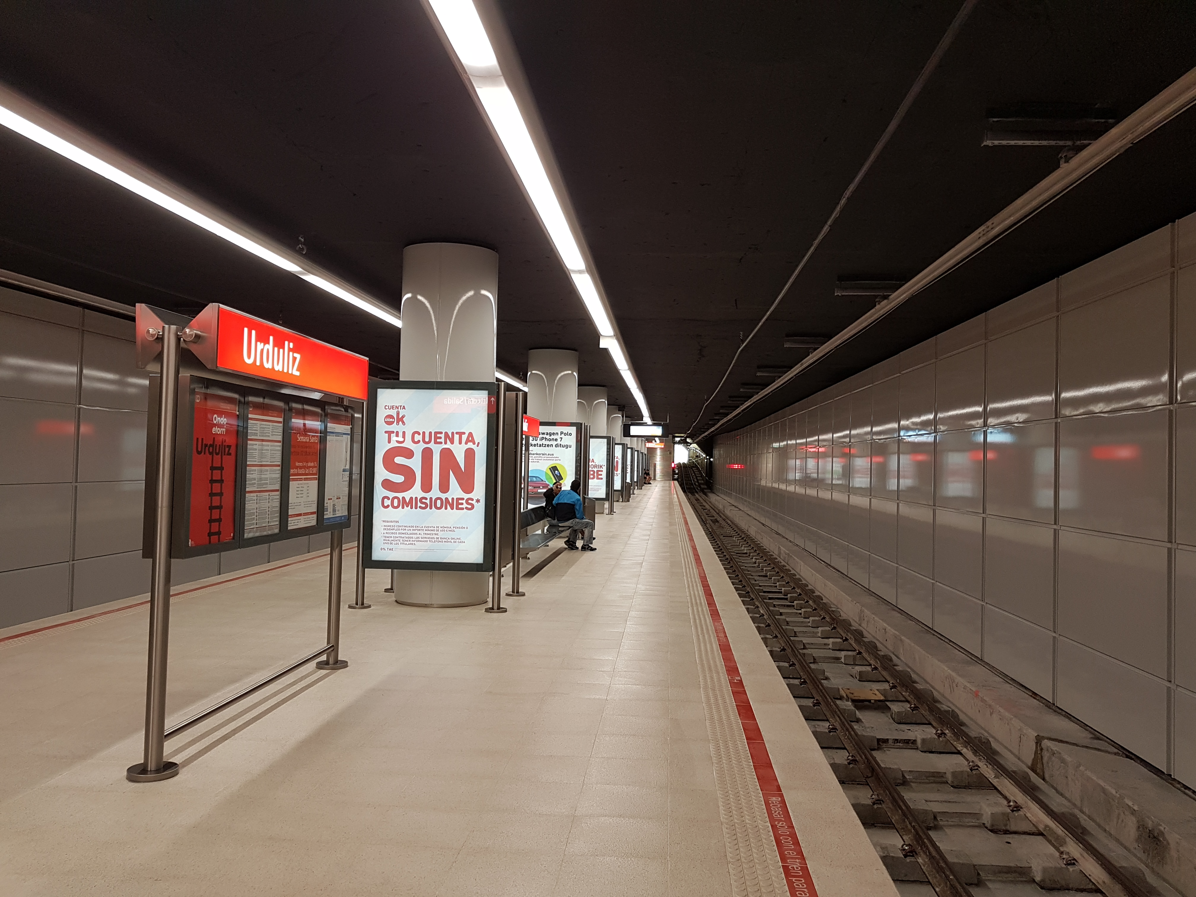 Estación de Urduliz.